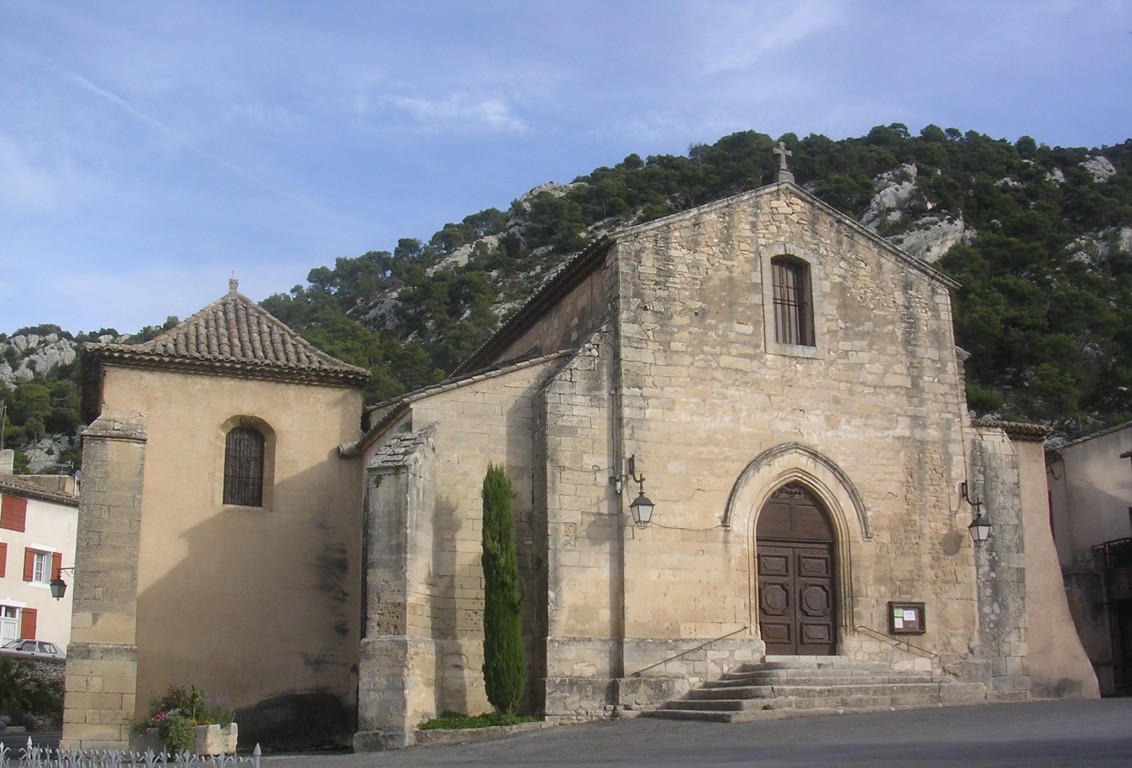 Eglise Notre Dame dela Nativité - Robion - Vaucluse - France